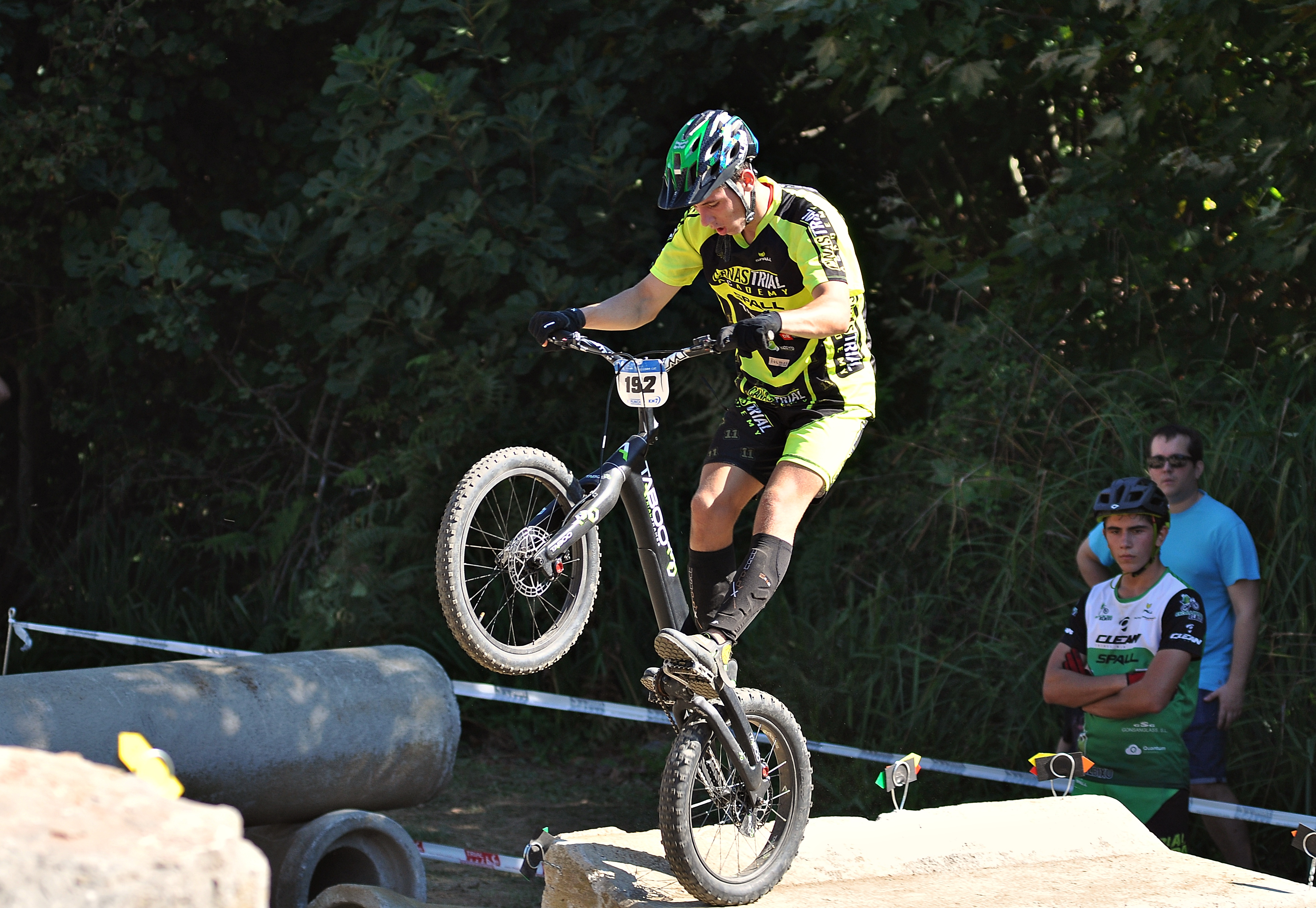 Vallgorguina-2018